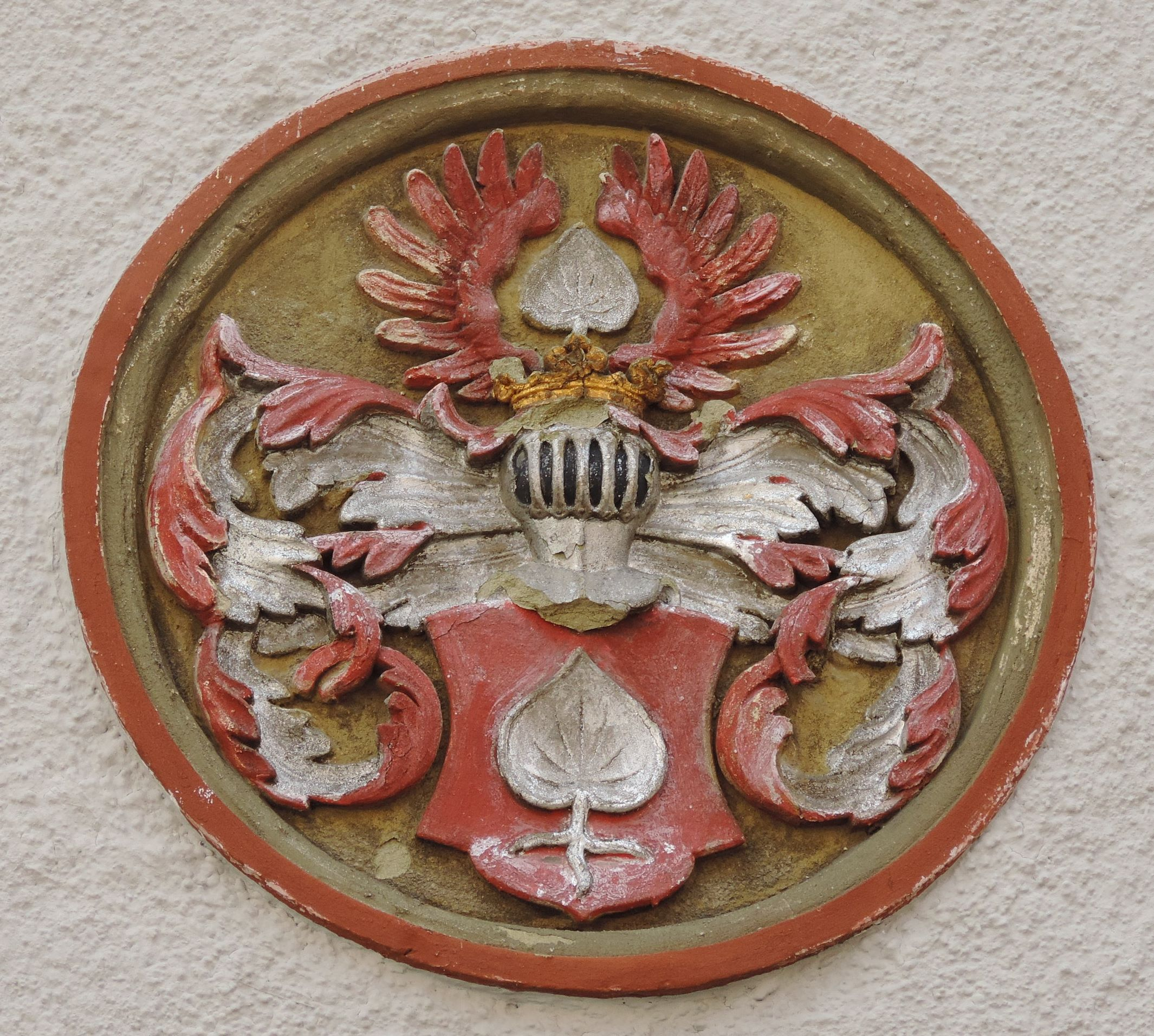 Wappen der Frickhinger am Haus Polizeigasse 7 in Nördlingen